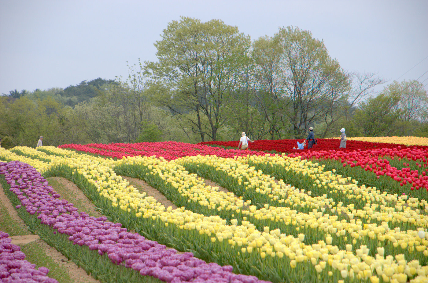 世羅高原農場 Tulip